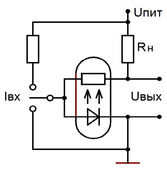 Ячейка памяти на резисторной оптопаре. Кратковременное замыкание ключа вверх (импульс втекающего тока) защёлкивает схему в низком уровне, кратковременное замыкание вниз (импульс вытекающего тока) - в верхнем. Управление именно током, минимальная длительность импульса должна перекрывать задержку включения или выключения фоторезистора. Описание работы в русскоязычных источниках - ??, в англоязычных - например, Satyam, M.; Ramkumar, K. (1990) Foundations of electronic devices ISBN 9788122402940 c. 555.